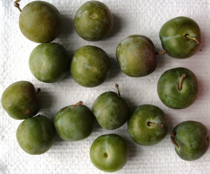 Grosse Gruene Renekloden